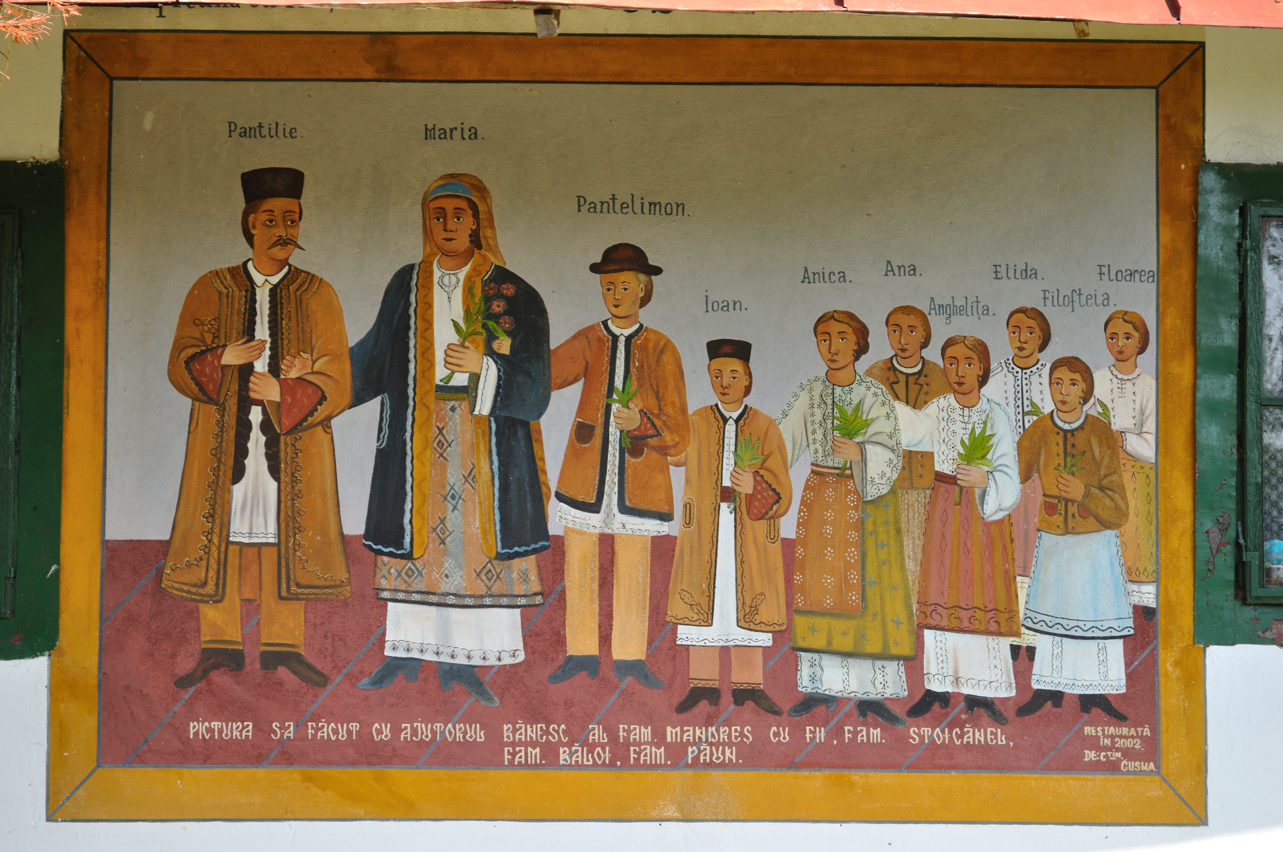 Biserica de lemn „Sfântul Dumitru” din Negoiești, județul Mehedinți